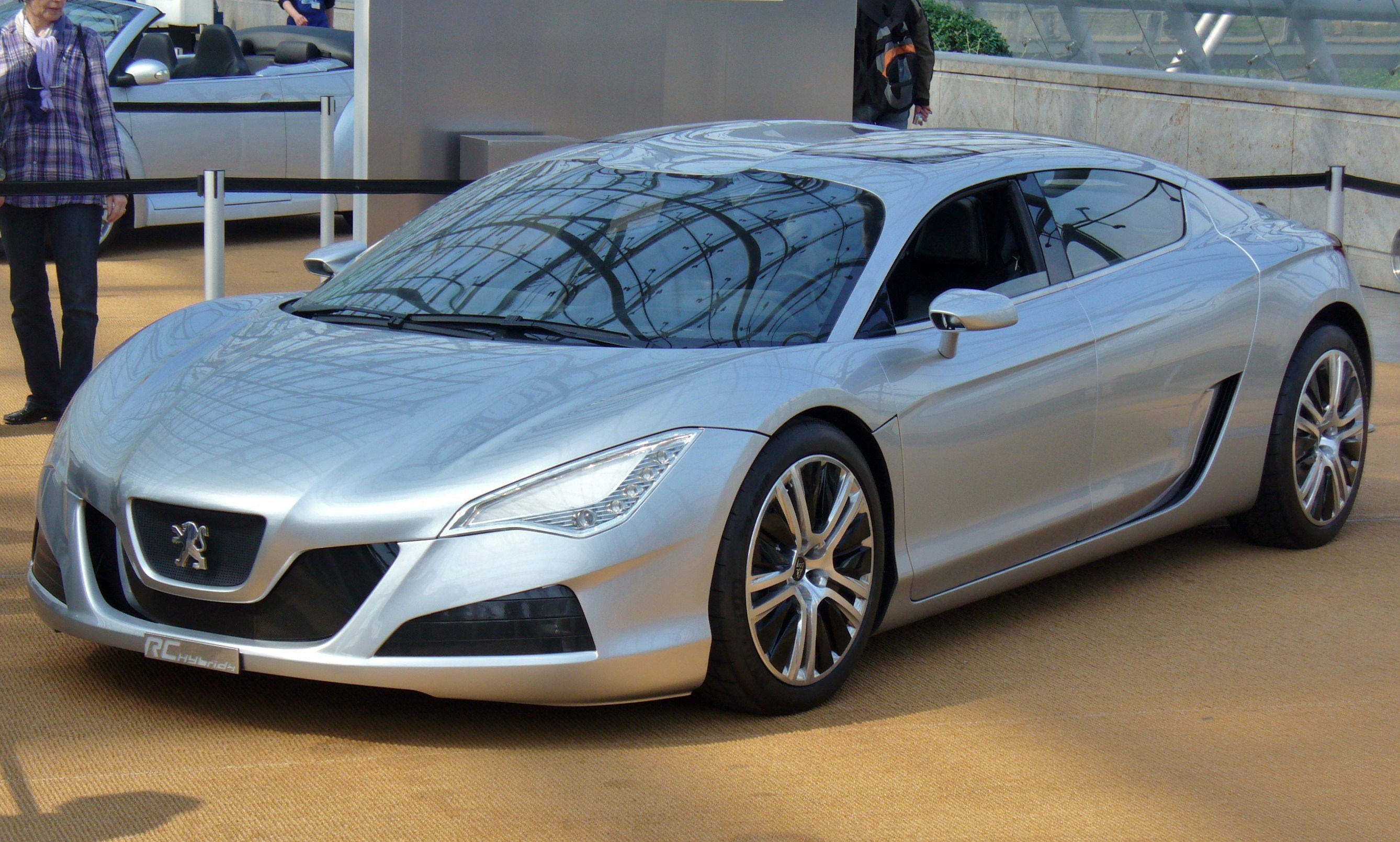 Peugeot RC HYbrid4